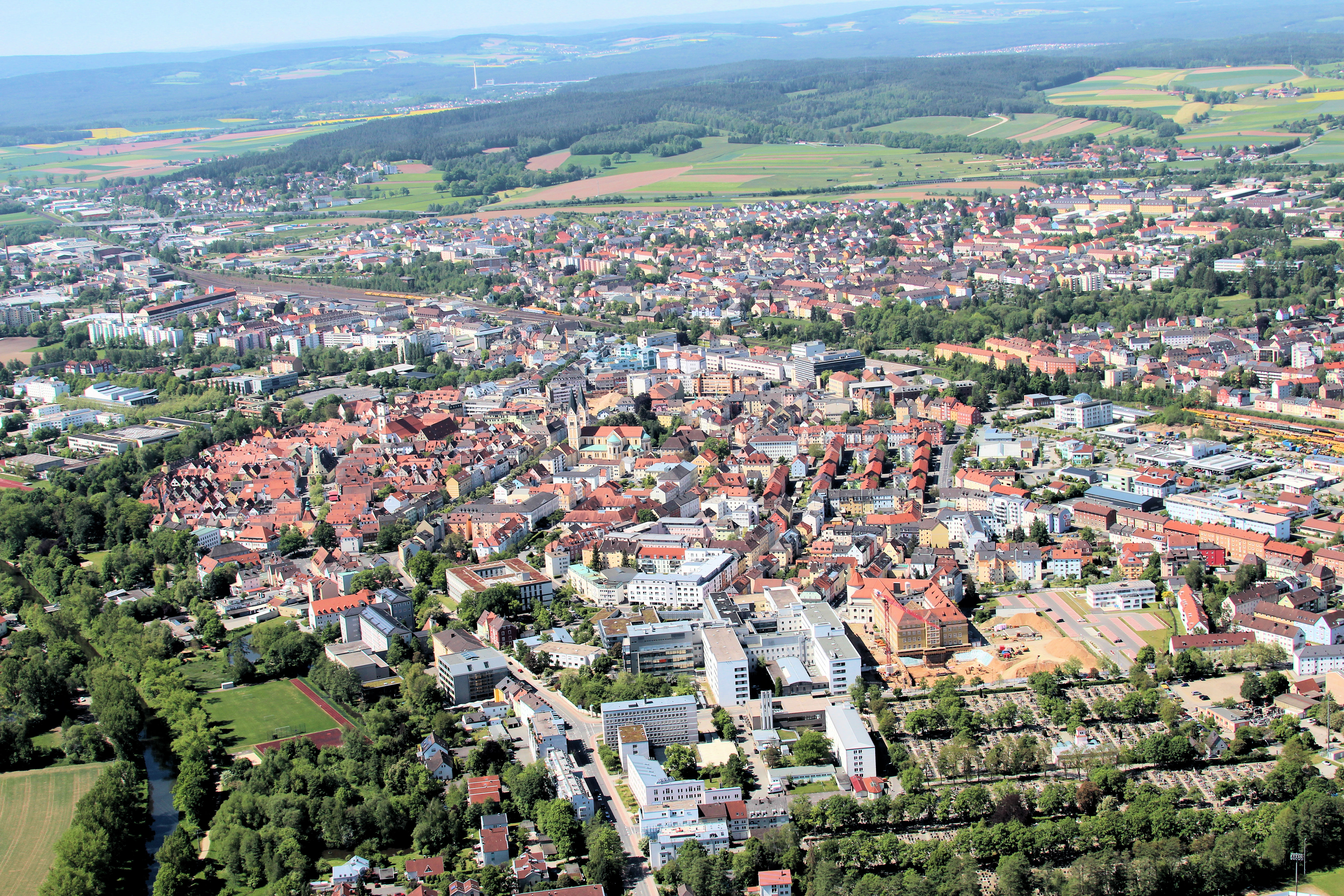 Weiden in der Oberpfalz, Regierungsbezirk Oberpfalz, Bayern